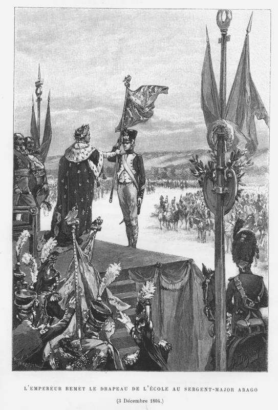 L’Empereur Napoléon 1er remet le drapeau de l’École au sergent-major François Arago, 3 décembre 1804 (Gravure de 1887). Cette gravure comporte des erreurs historiques. Ainsi, Napoléon ne remit par personnellement chaque drapeau, la réalité étant probablement plus fidèlement représentée sur La Distribution des aigles, tableau de Jacques Louis David. François Arago, bien que porte-drapeau, ne fut reçu que 6e du concours.